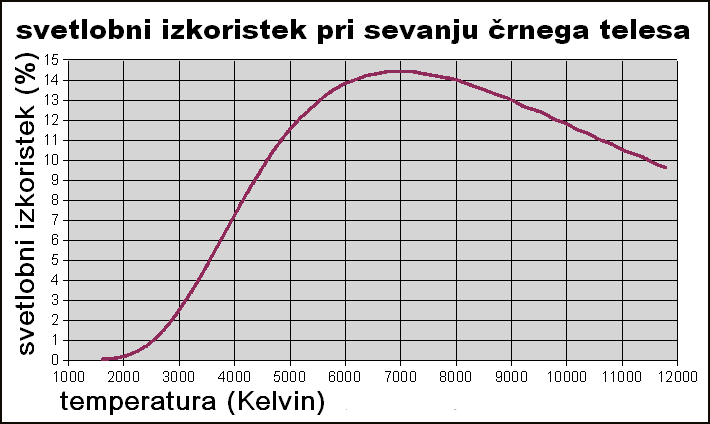 Svetlobni izkoristek črnega telesa kot funkcija temperature.